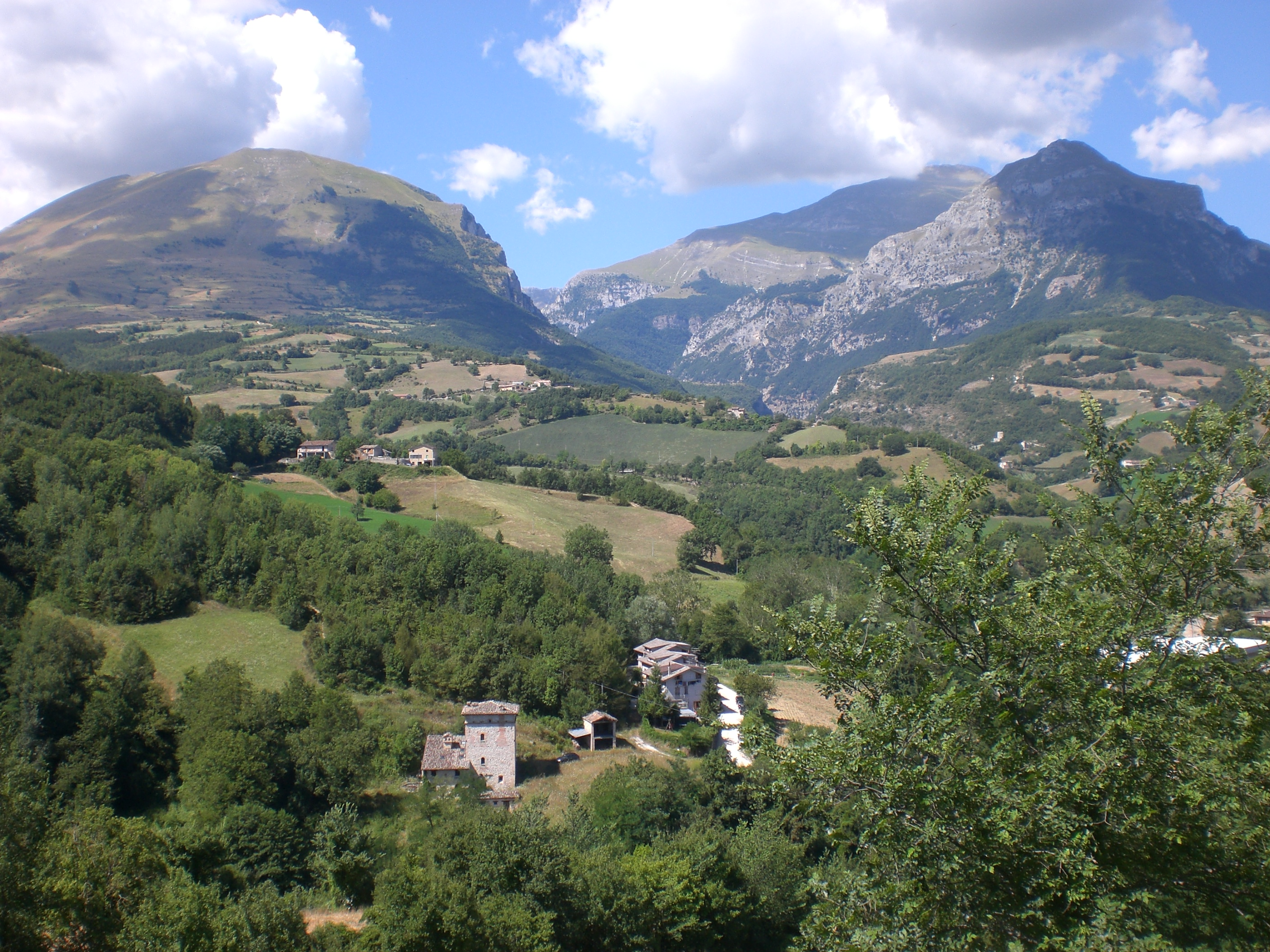 veduta sui Monti Sibilla e Pizzo Regina da Montefortino